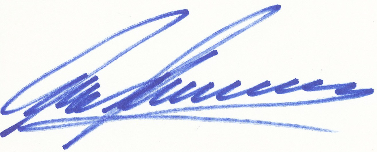 Autogramm Udo Thomer